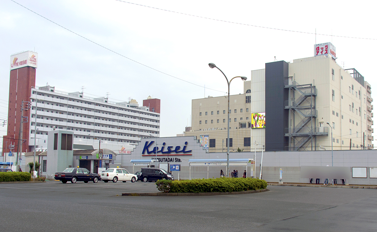 京成電鉄株式会社京成本線勝田台駅、東葉高速鉄道株式会社東葉高速線東葉勝田台駅